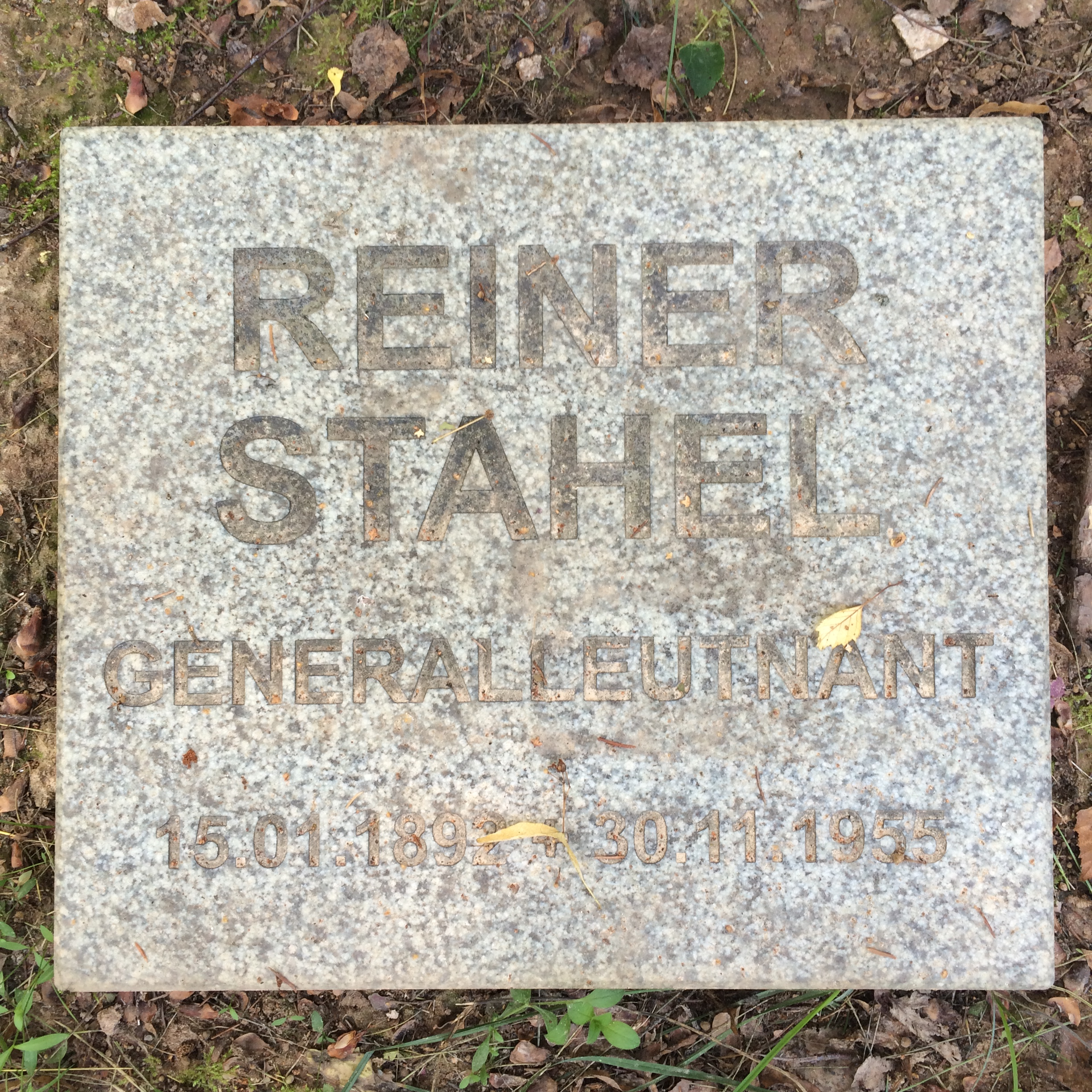 Tombstone; Cherntsy Memorial